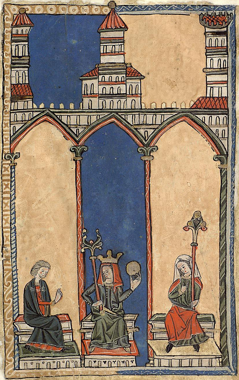 Miniatura medieval onde se representa a Bernarde Peres de Trava (esquerda), a raíña Urraca (centro), e a condesa Tareixa de Portugal (dereita). Manuscrito gótico do desaparecido mosteiro de Toxosoutos.